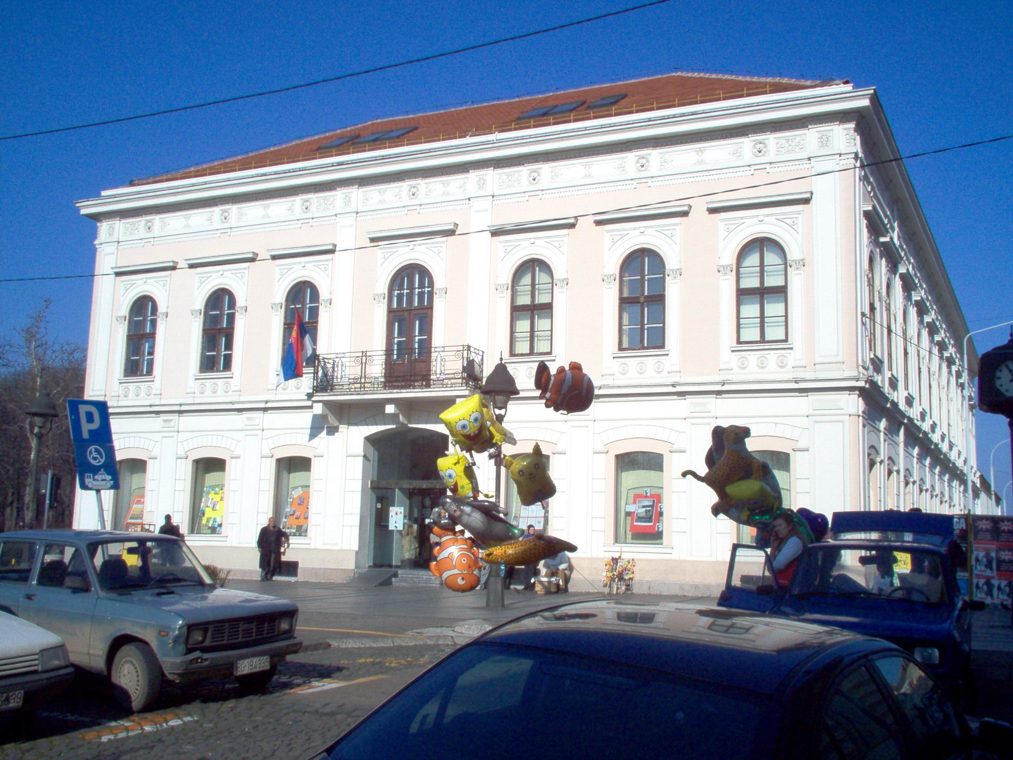 Библиотека града Београда